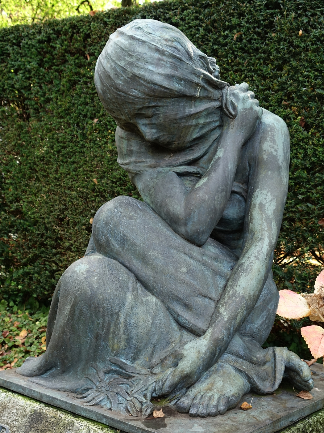 Grabskulptur für Familie Fasser-Schmid-Murbach-Huguenin auf dem Friedhof am Hörnli. Von Édouard-Marcel Sandoz (1881–1971) Bildhauer, Aquarellmaler.